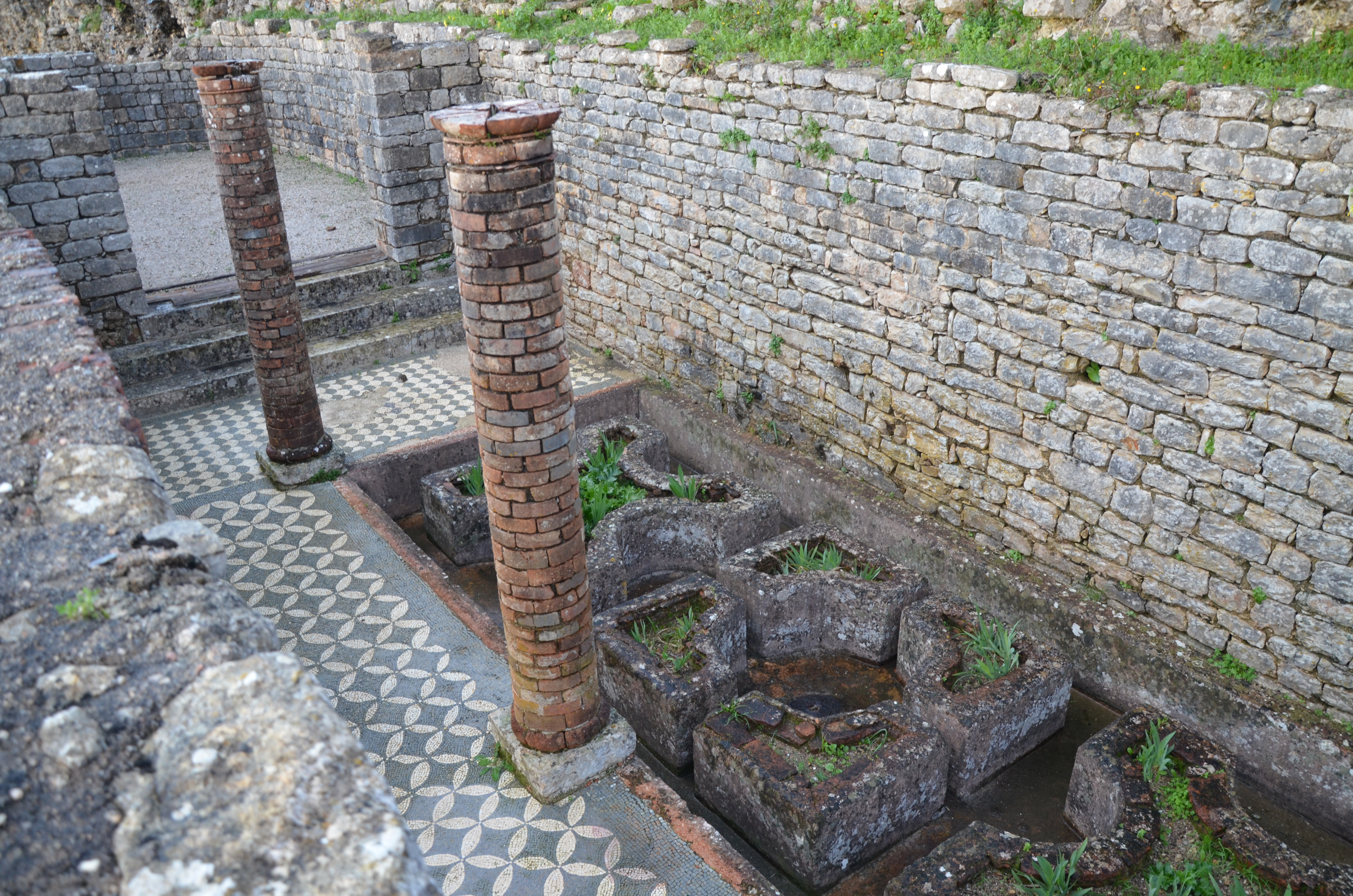 Conimbriga